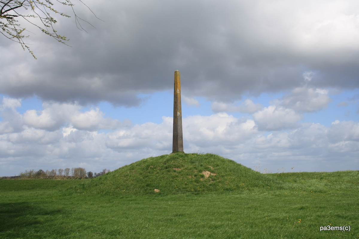 Gedenknaald voor J.C. Baron van Haersolte (Kampereiland)